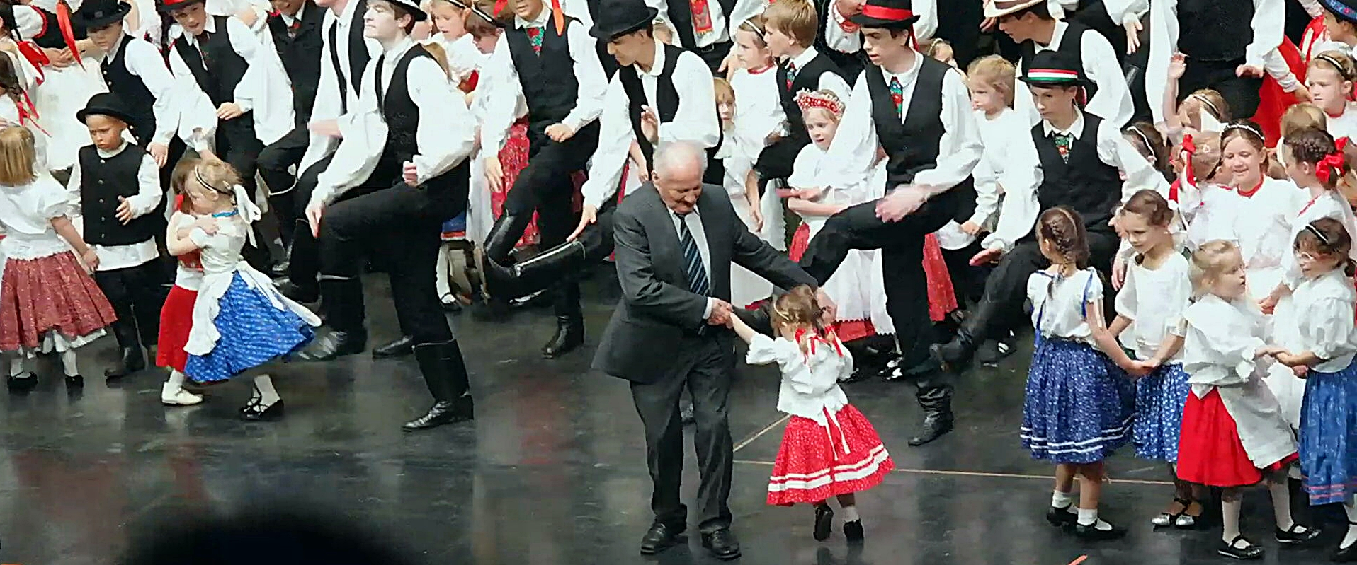 Gálaműsorral köszöntötték Timár Sándort növendékei, aki 2014-ben Kossuth-díjat vehetett át. Kongresszusi Központ, Budapest.